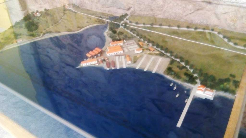 Maqueta de Astano, nas súas orixes. Exponav.